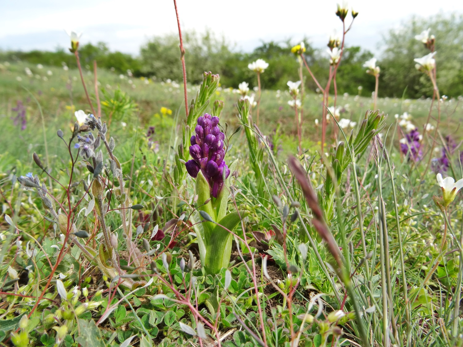 Kleines Knabenkraut (Anacamptis morio) und andere Pflanzen auf einer Orchideenwiese bei Frössnitz im Naturschutzgebiet „Blonsberg“; Erfolg der örtlichen Schaafbeweidung